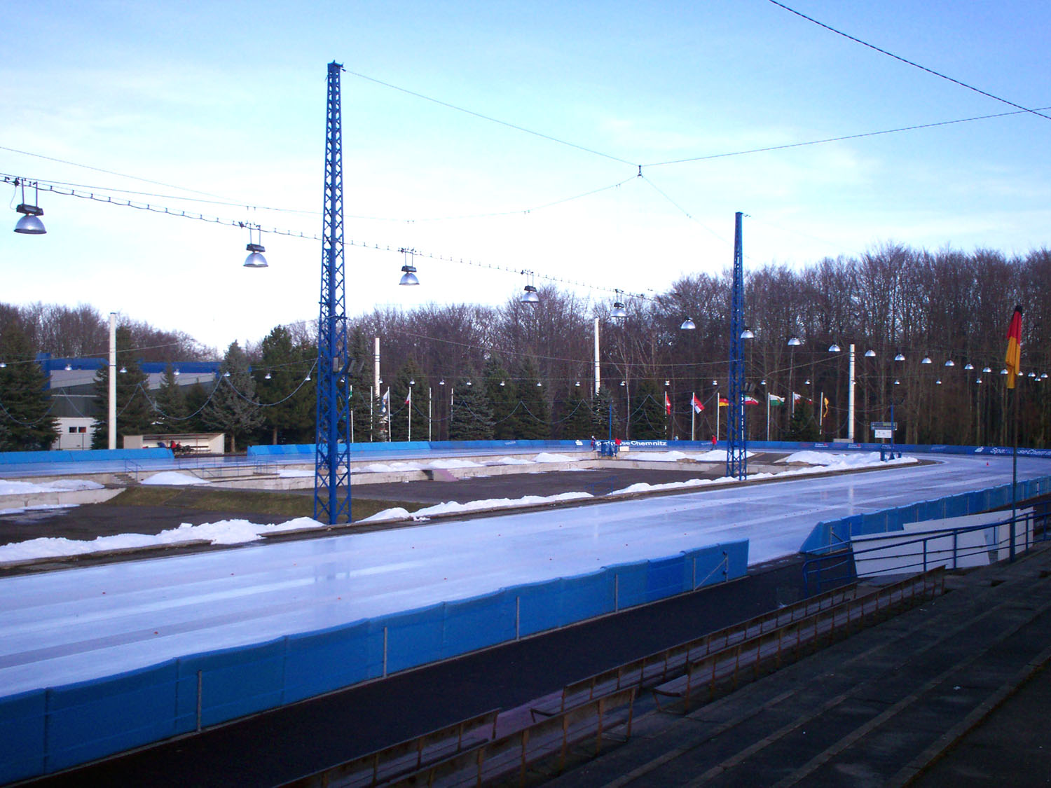 Masters DM 2008 in Chemnitz (Sachsen, Deutschland)